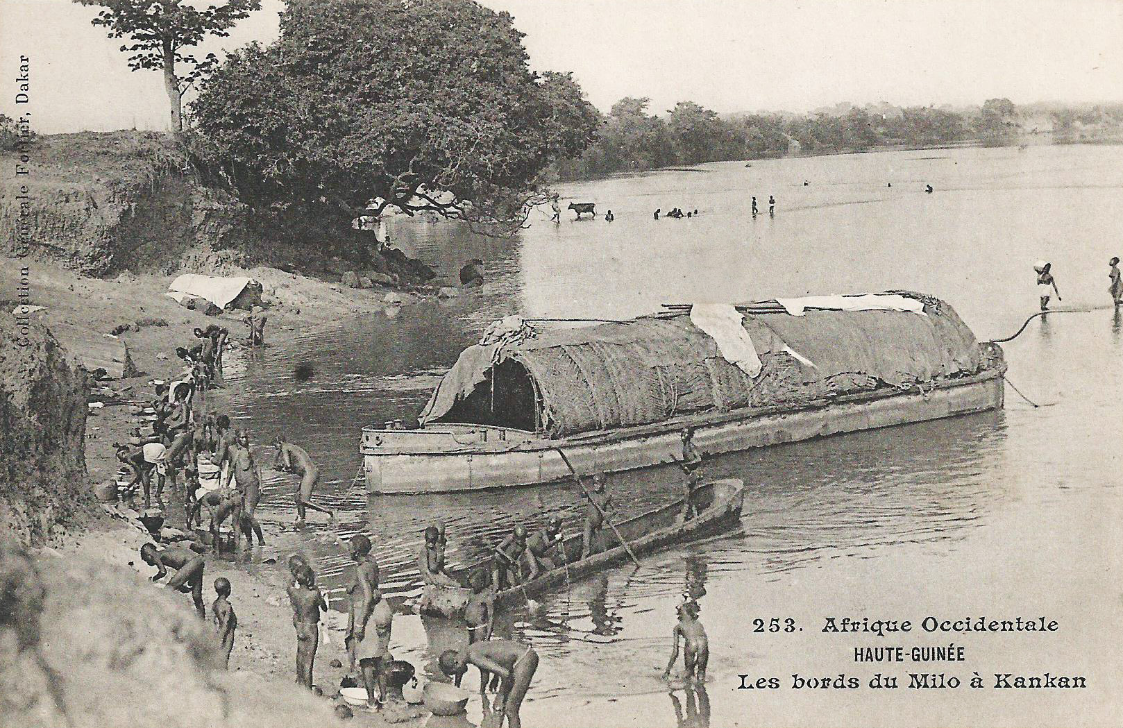 François-Edmond Fortier, Les bords du Milo à Kankan. Afrique Occidentale. Haute-Guinée